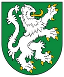 Znak obce Děhylov, okres Opava